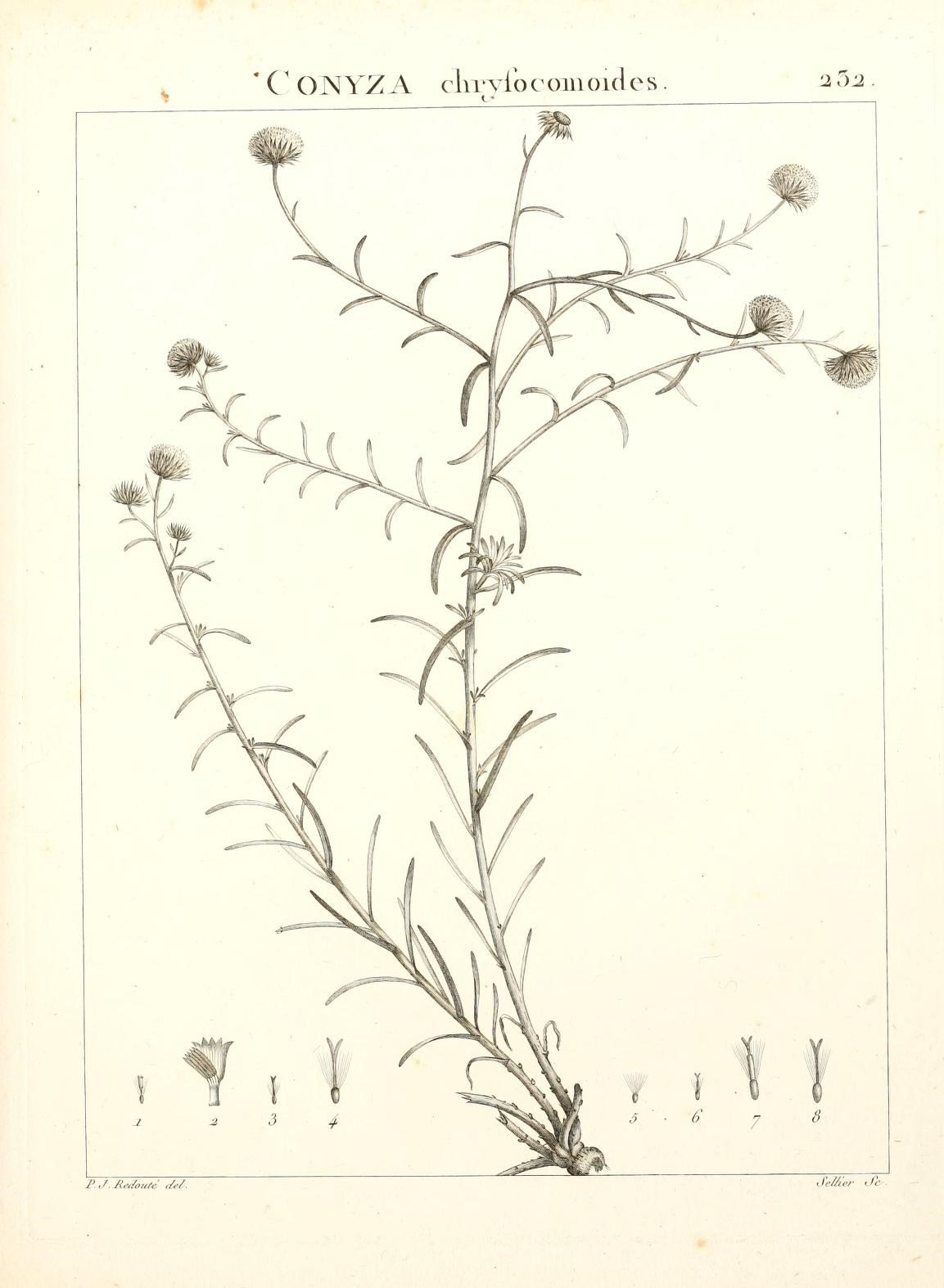 ' C ONYZA clirviocomoulcs '2 7)2 . P.J.Jie./o„te ,/e/. Je//,e/- .Jc